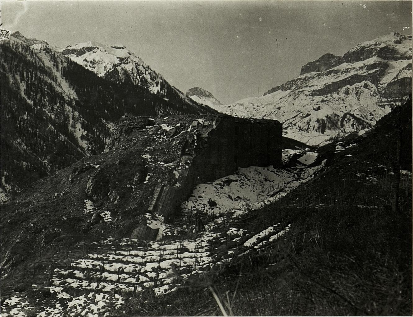 Col di Lana :Blick auf das zerschossene Werk La Corte bei Buchenstein